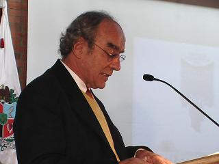 El profesor Darío Botero Uribe dirigió la revista Politeia de la Facultad de Derecho, Ciencias Políticas y Sociales de la Universidad Nacional por más de veinte años. La revista contó con ensayos del novelista R.H. Moreno-Durán, el filósofo Iván Soll, el profesor Mario Bettati, Germán Andrés Molina, Jesus Martin Barbero entre otros autores de renombre a nivel latinoamericano y mundial.